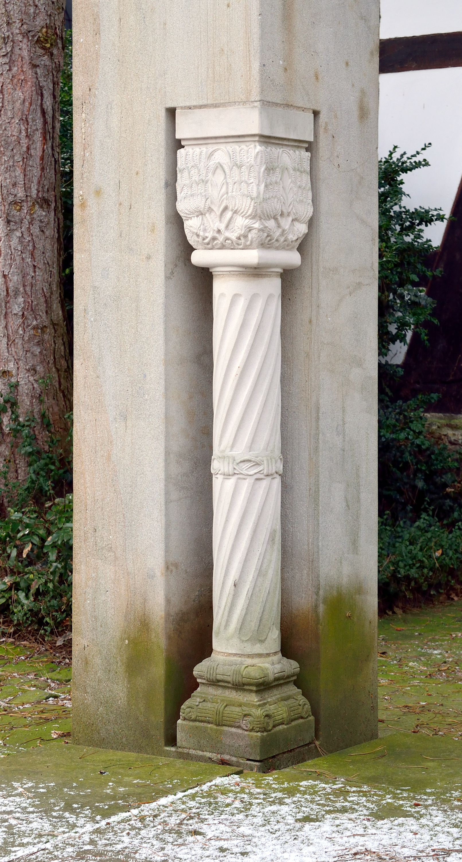 Replikat einer Portalsäule der zerstörten Synagoge von 1907 in Detmold